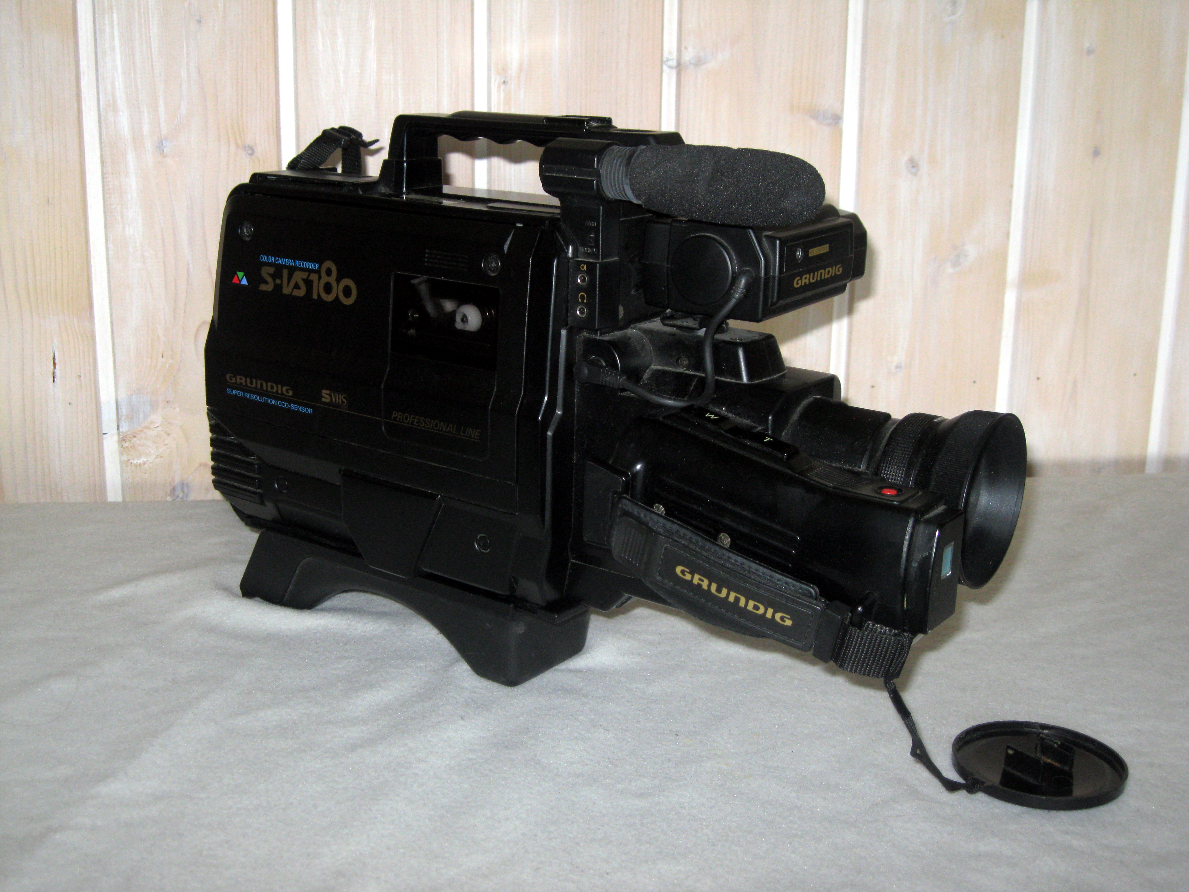 Grundig S-VS180 VHS kamera.